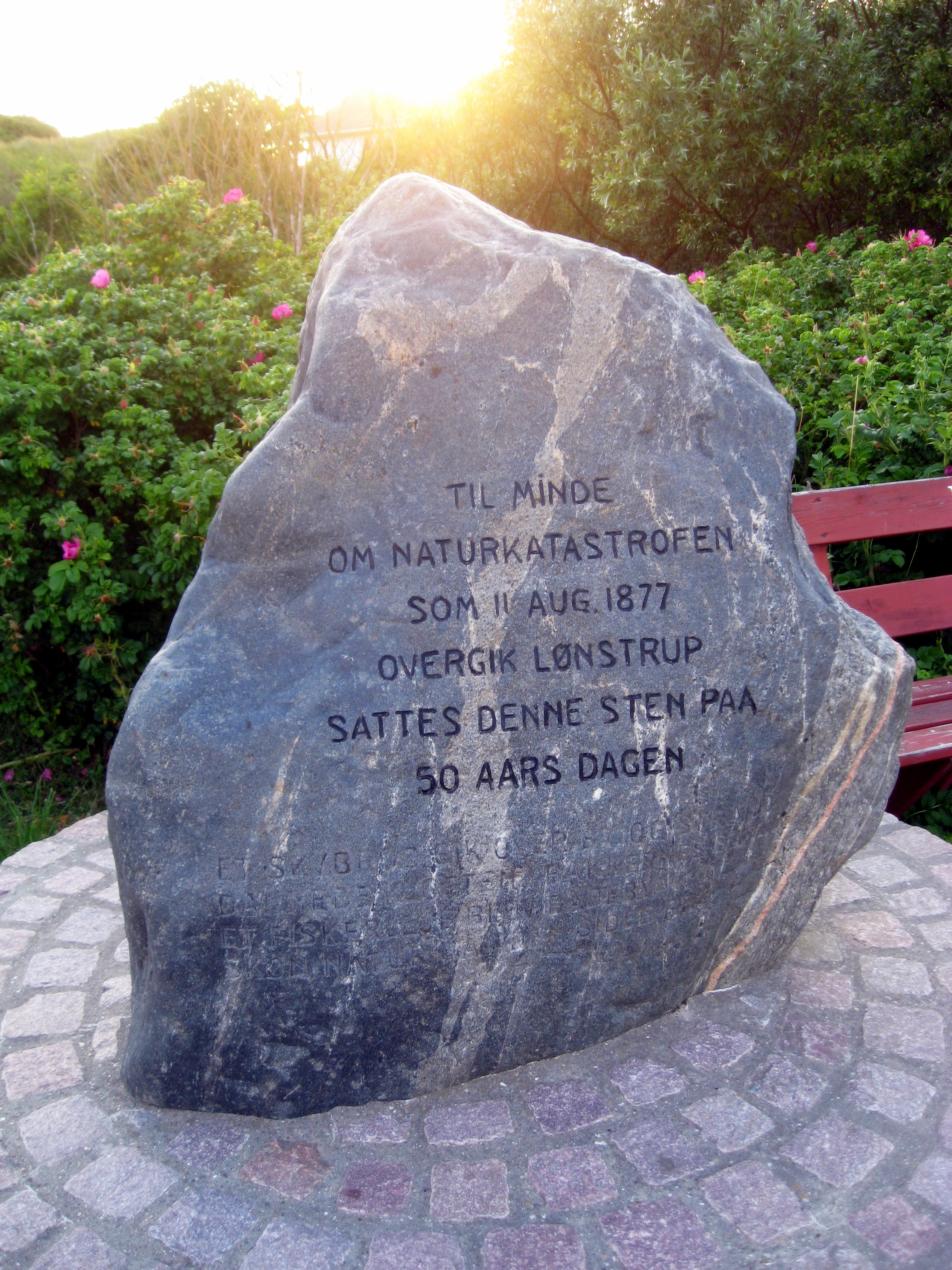 Mindesten ved Bækslugten i Lønstrup med inskriptionen:Til minde om naturkatastrofen, som 11. august 1877 overgik Lønstrup sattes denne sten paa 50 aars dagenEt skybrud gik over by og strandDannede kløften i bakkernes sandEt fiskerleje blev badebySkøn natur gav den siden ry